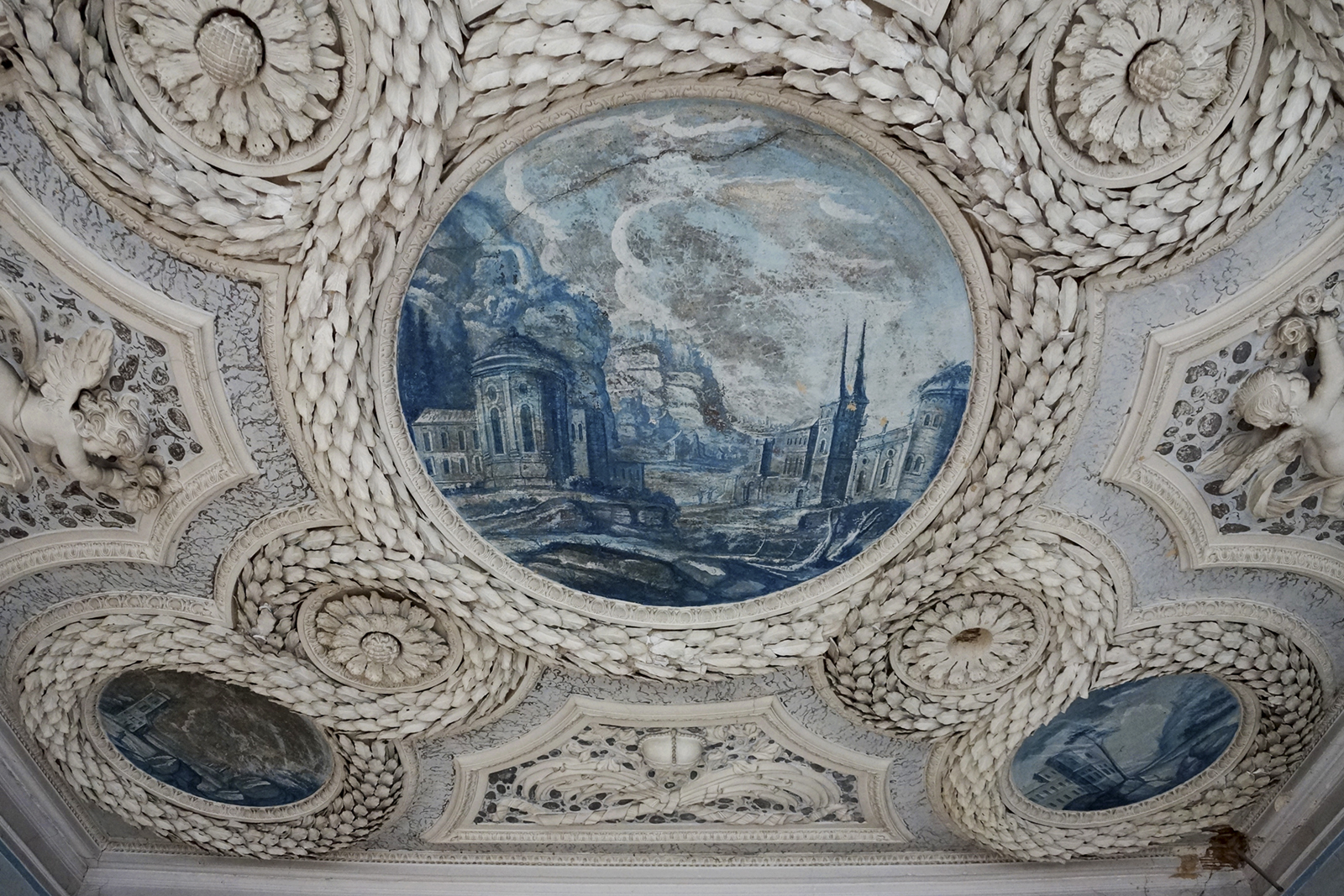 Friedrichwerth, Schloss Friedrichwerth, Stuckdecke